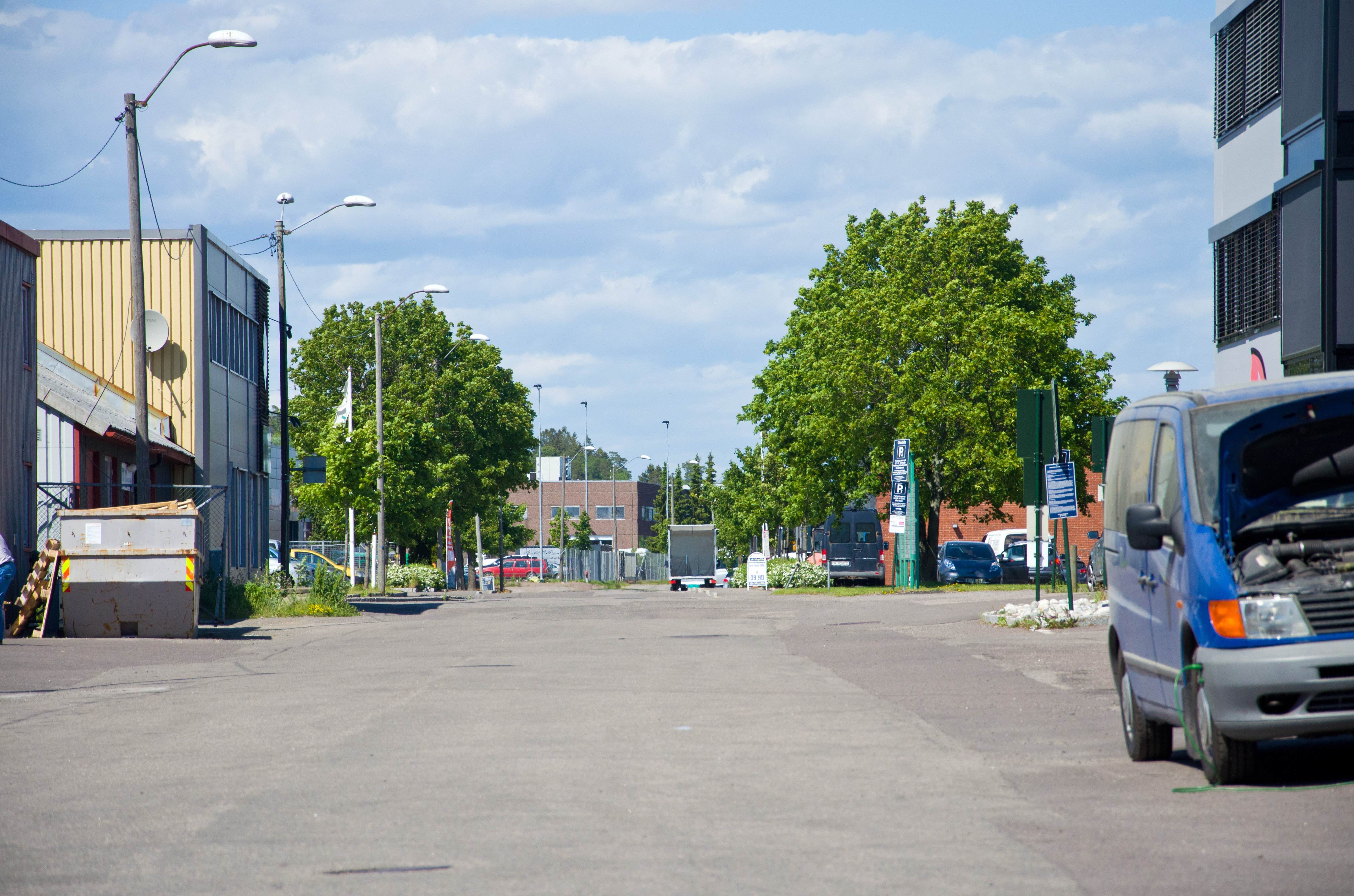 Kilengaten